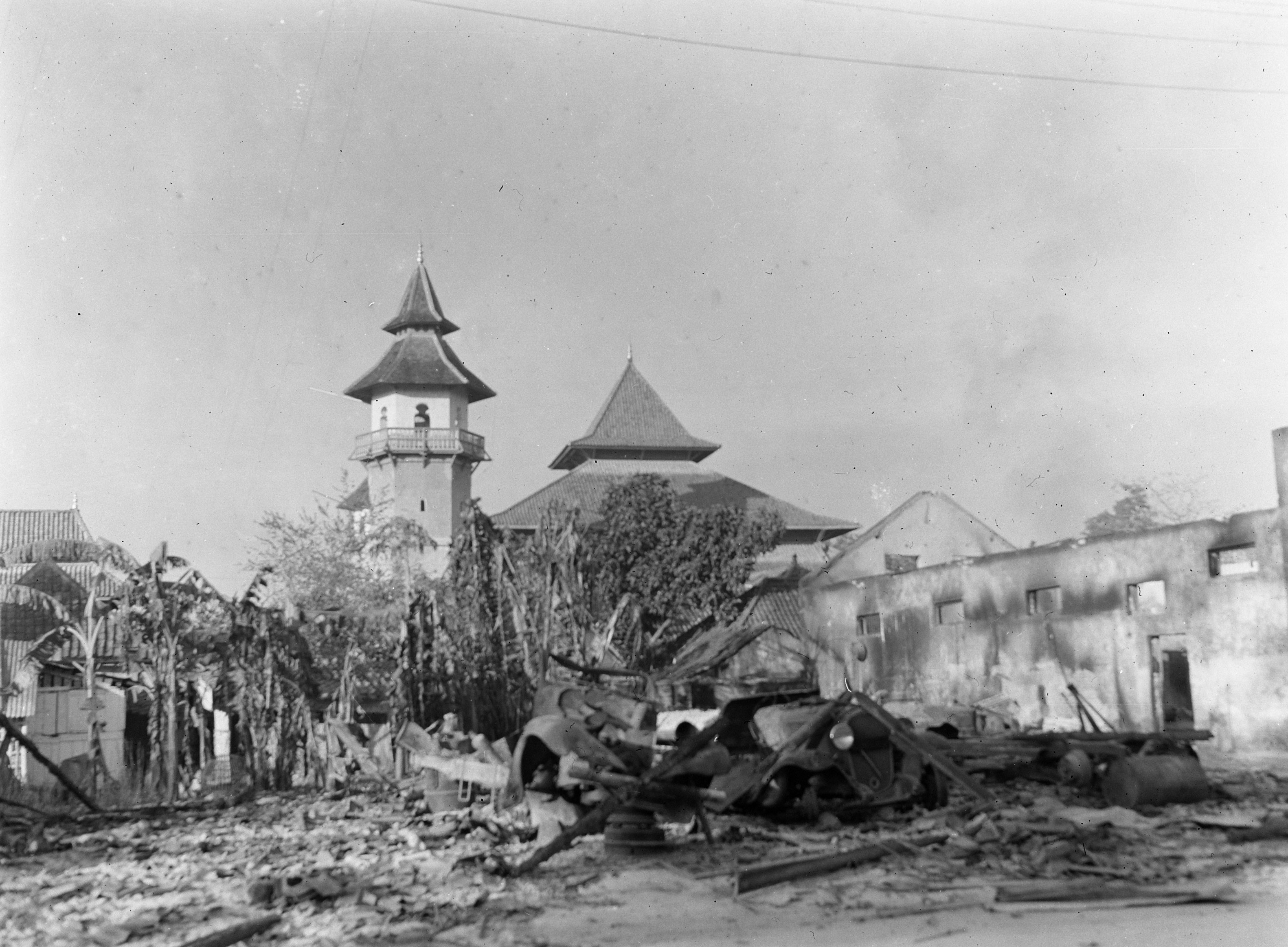 Collectie / Archief : Fotocollectie Dienst voor Legercontacten Indonesië Reportage / Serie : [DLC] Madoera Beschrijving : Verwoeste en in brand gestoken Chinese eigendommen te Pamekasan Datum : augustus 1947 Locatie : Indonesië, Madura, Nederlands-Indië, Pamekasan Fotograaf : Fotograaf Onbekend / DLC Auteursrechthebbende : Nationaal Archief Materiaalsoort : Negatief (zwart/wit) Nummer archiefinventaris : bekijk toegang 2.24.04.03 Bestanddeelnummer : 11900